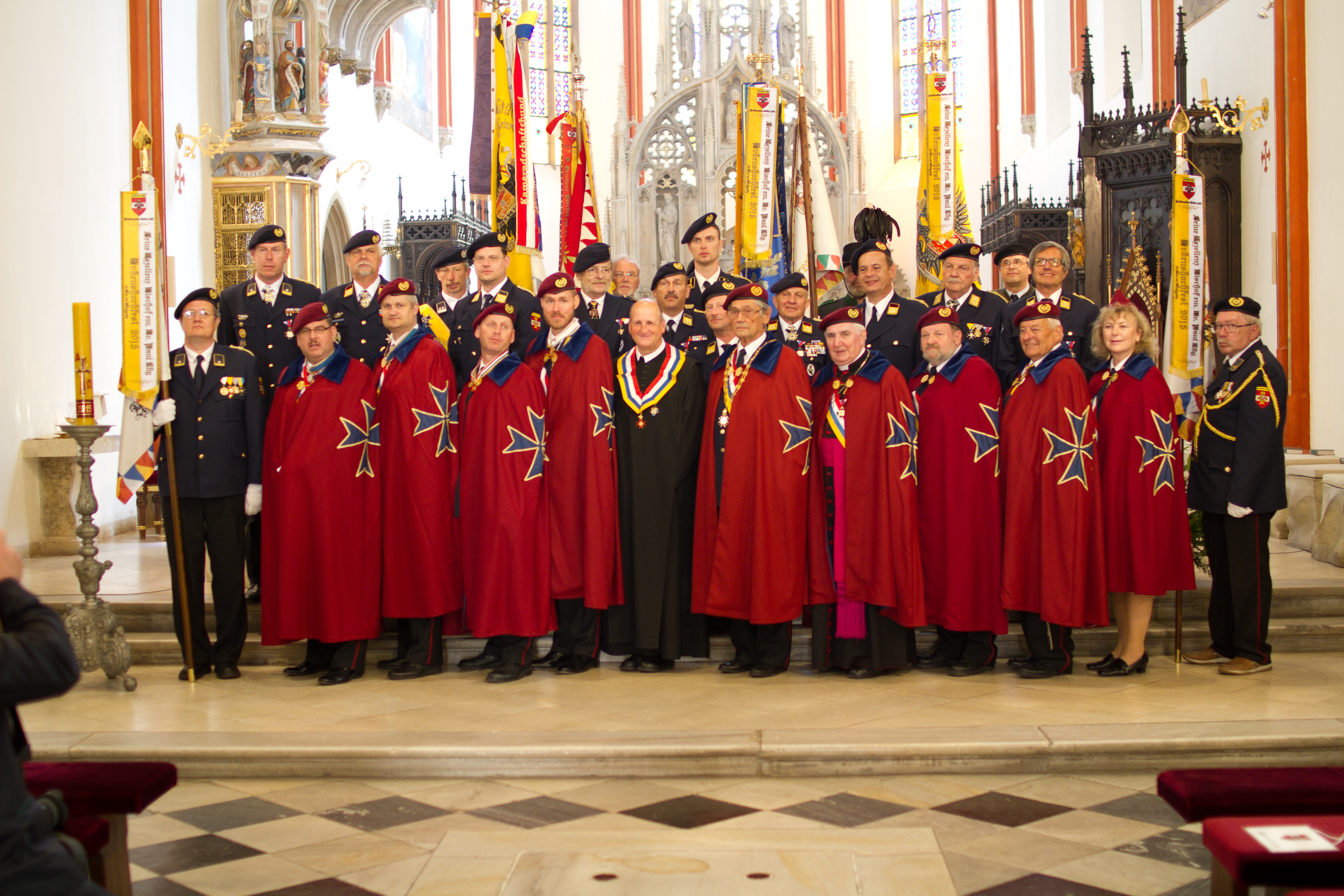 Členové řádu na Investituře v Hradci Králové v roce 2015